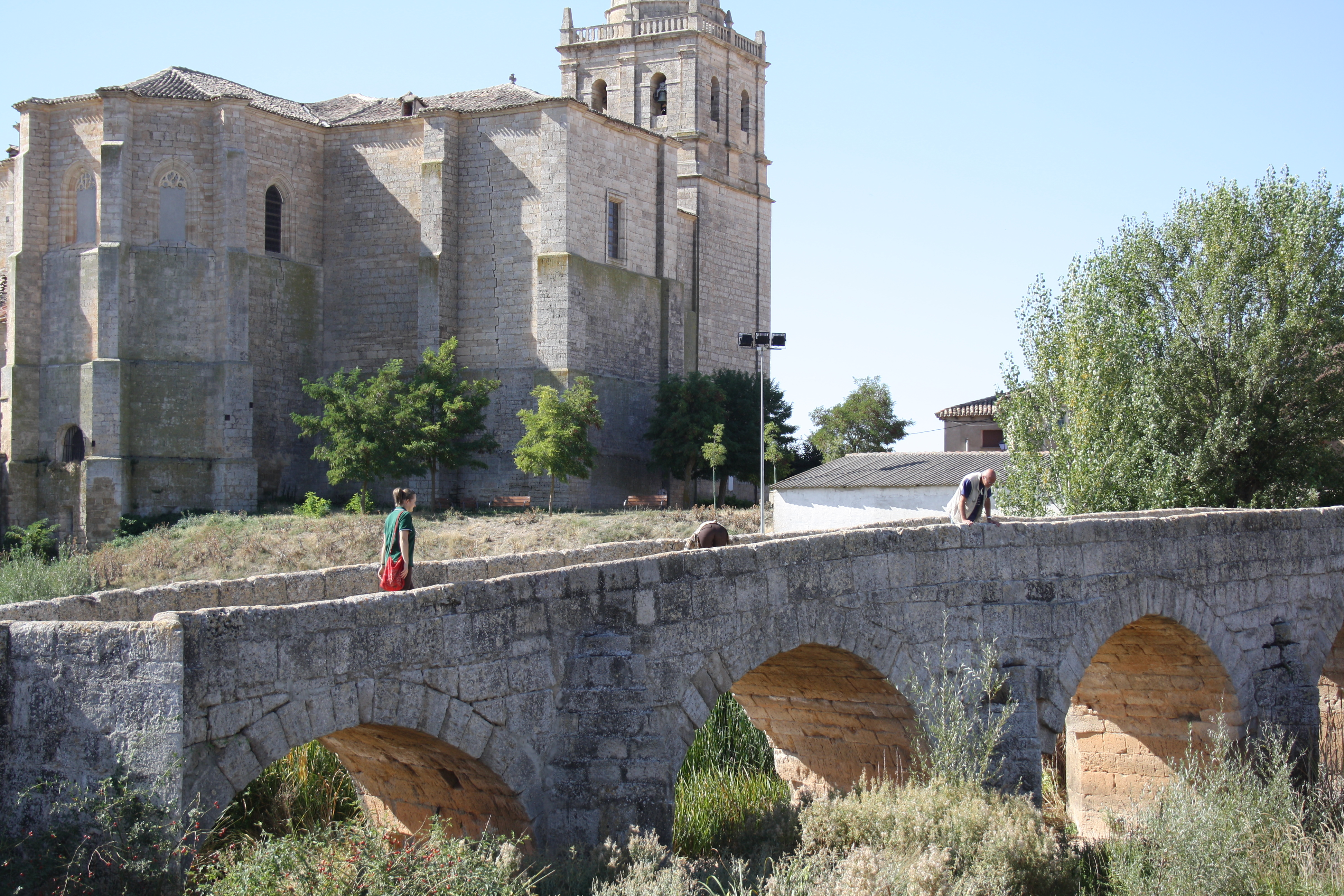 Ponte romano con Iglesia de la Asunción di Villasandino